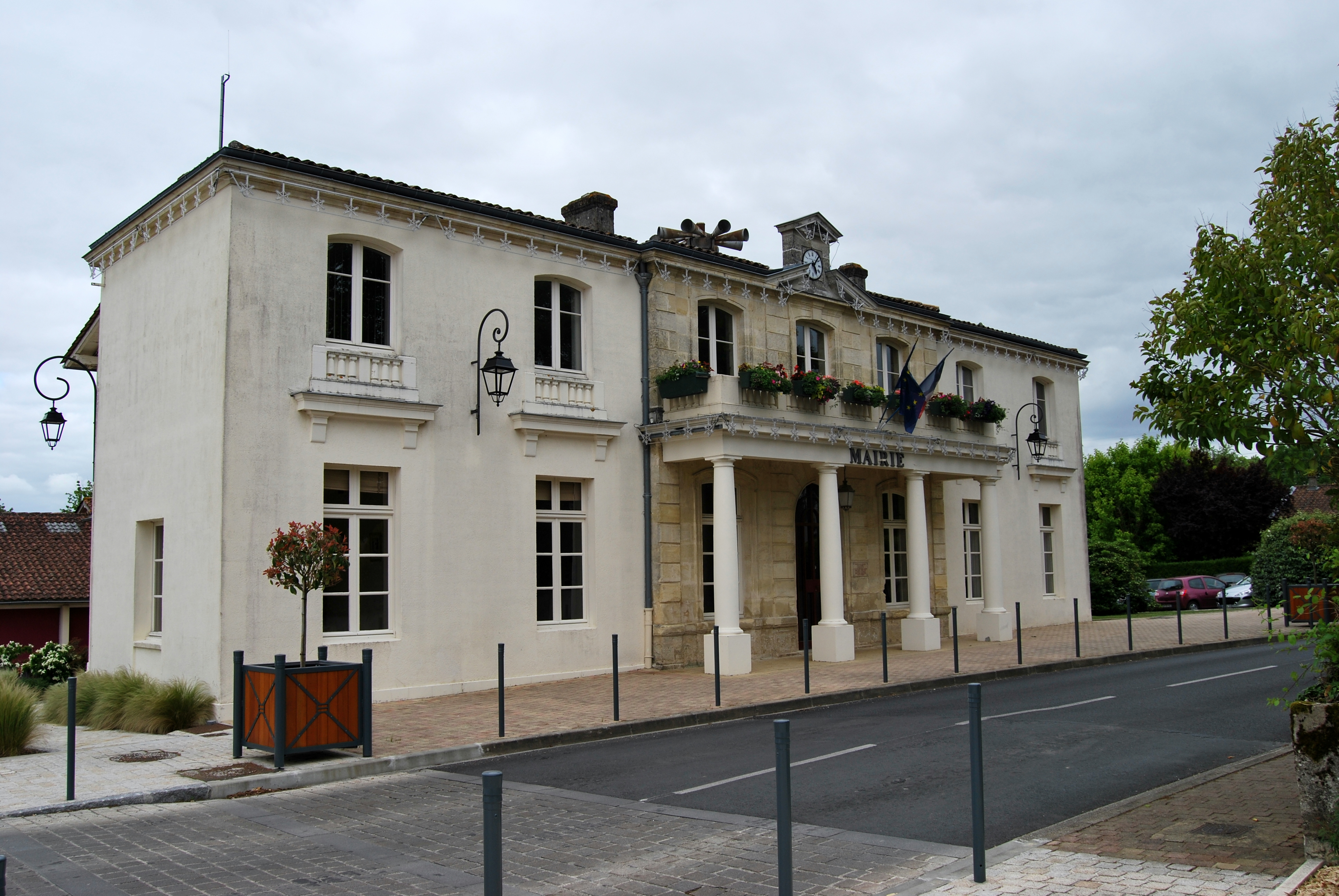 Yvrac Mairie